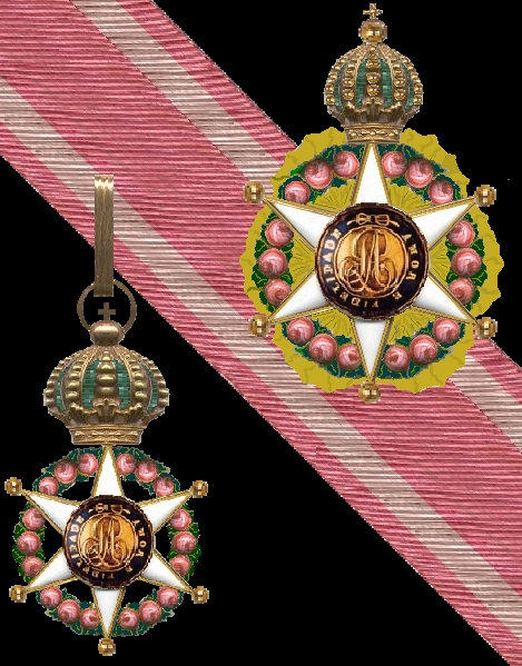 Eigen tekening